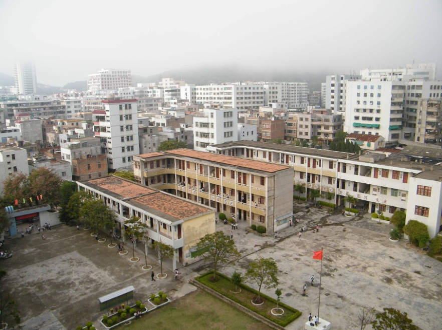 青篮小学 俯拍 2010.2.26